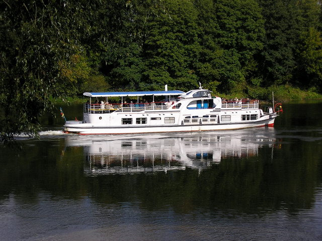 Garlaivis, kiekvieną vasarą kursuojantis tarp Druskininkų ir Liškiavos